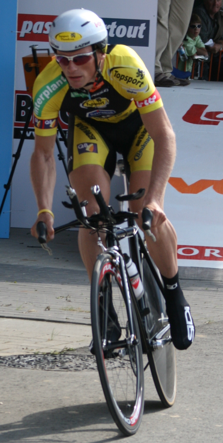 Steven De Neef aux championnats de Belgique du contre-la-montre, à Mouscron